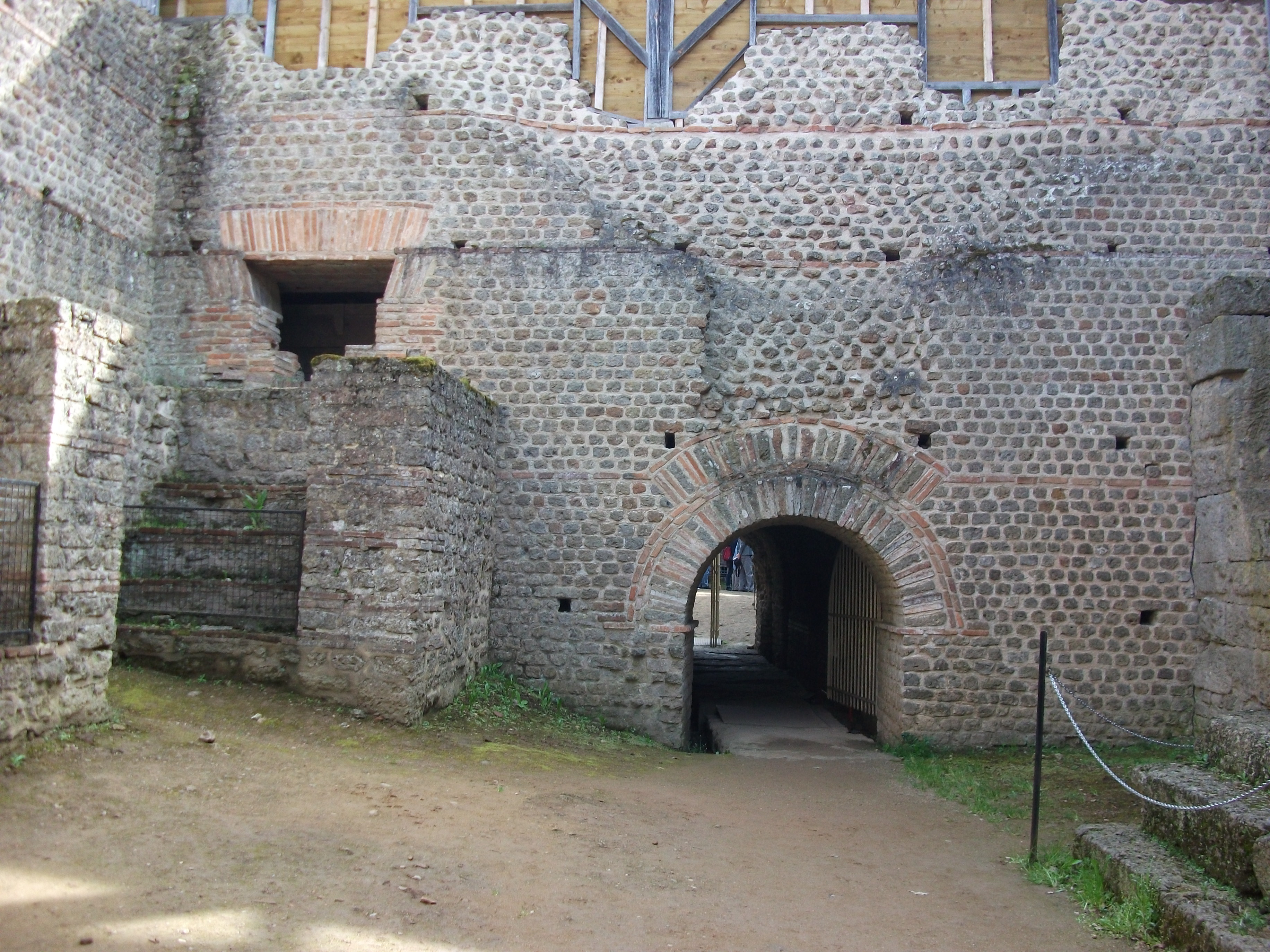 Cassinomagus, commune de Chassenon, Charente, France S-O. Thermes classés MH. .